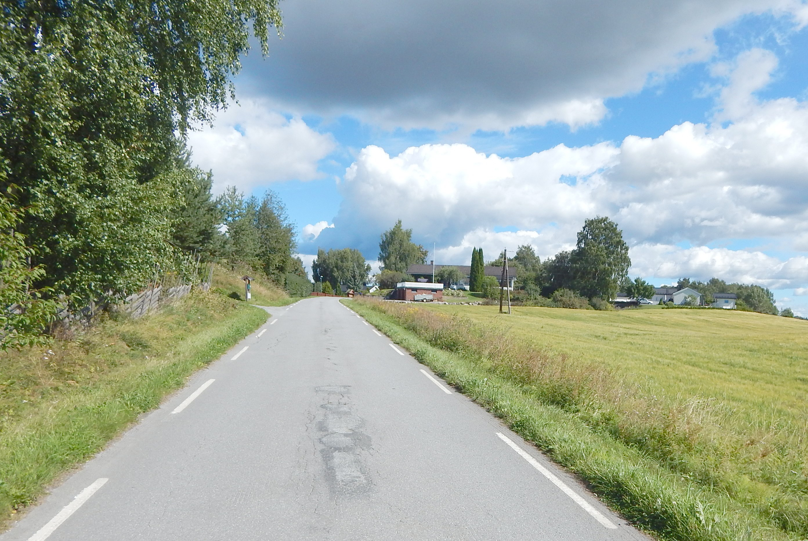 Olsrudvegen (fylkesvei 1818, tidl. 120)